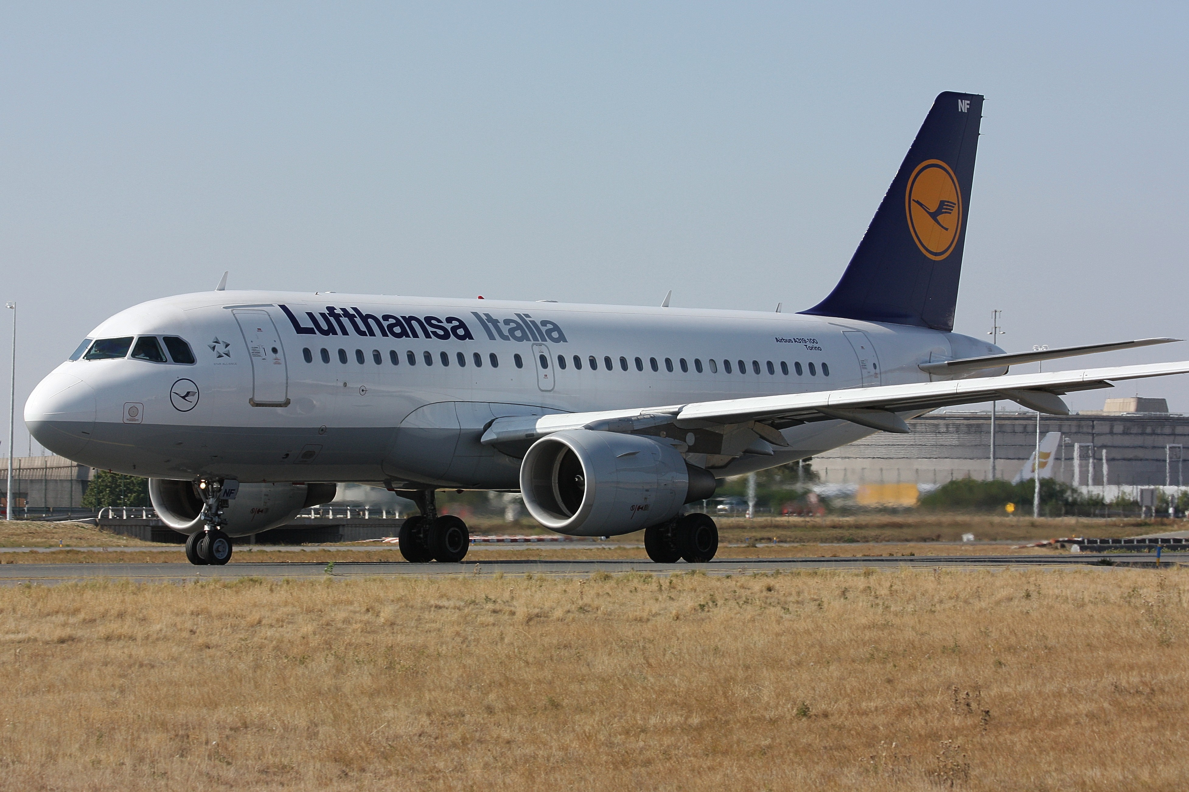 A319 D-AKNF (Torino) de Lufthansa Italia au roulage à l'aéroport Roissy Charles de Gaulle.